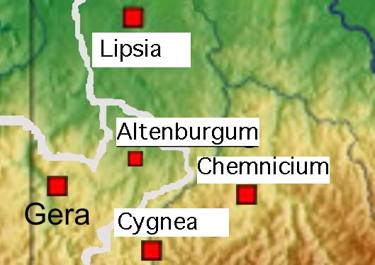 Topologiekarte (Altenburg) in Latin. German original made by: WikiABG) mit den Vorlagen: Bild:Deutschland topo.jpg Bild:Germany Laender Map.png